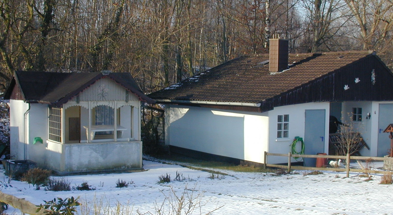 Bochum Gartenlauben im Wandel der Zeit